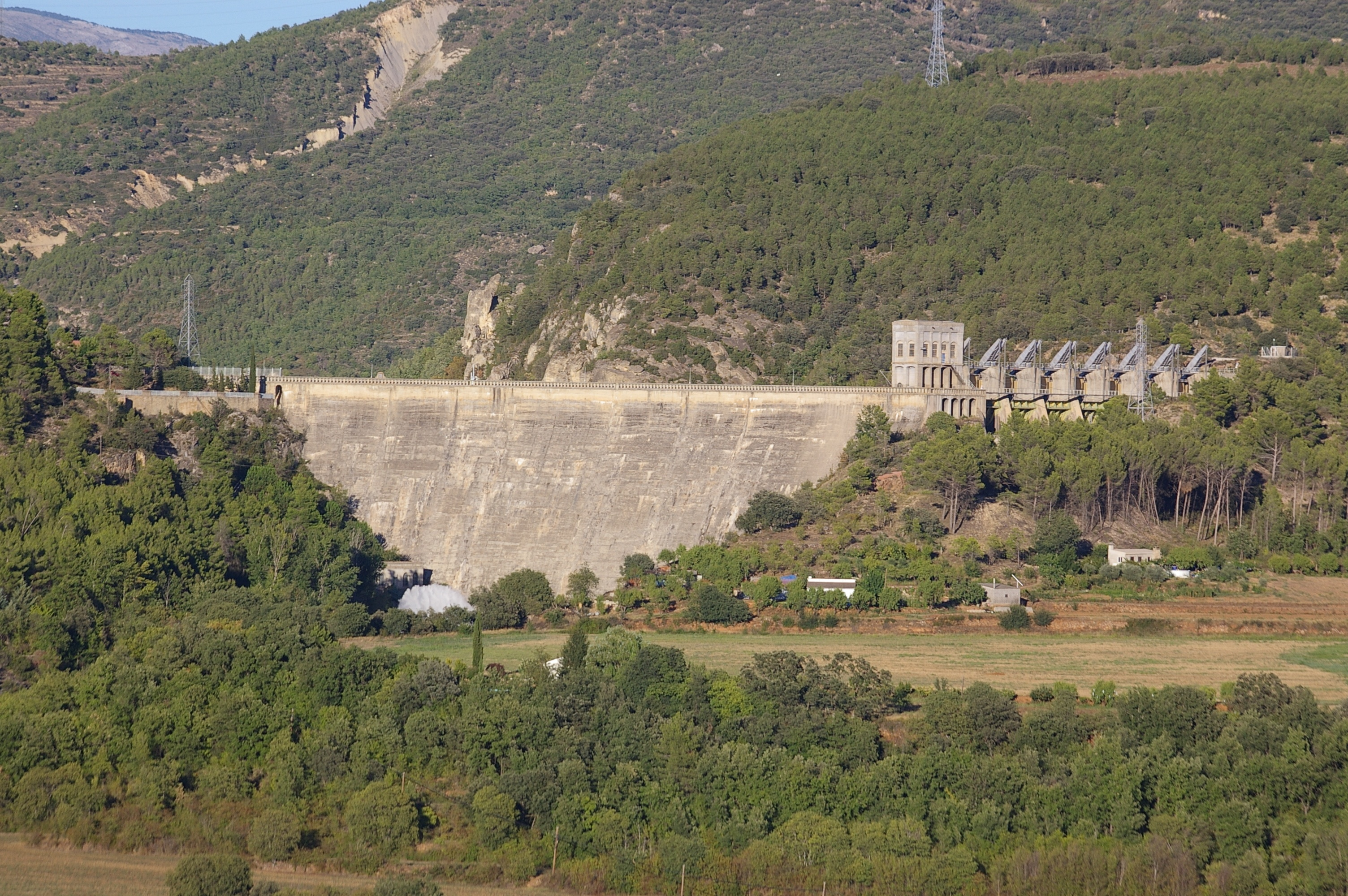 Vista de la presa de Talarn, en Lleida.